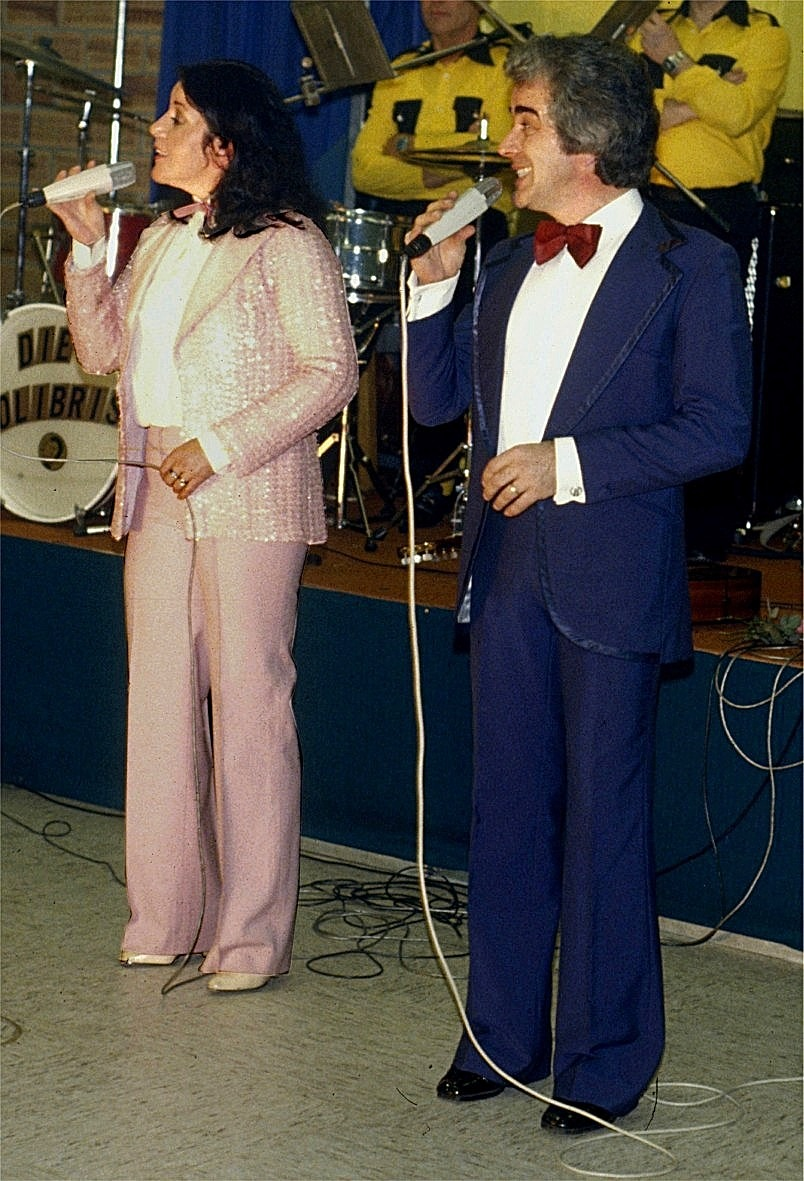 Renate und Werner Leismann, Konzert in Mülheim-Kärlich